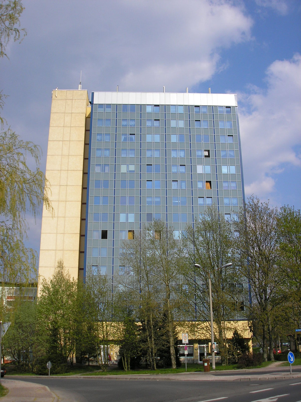 Stollenhochhaus in Ilmenau (Thüringen). Höhe: 52 Meter.